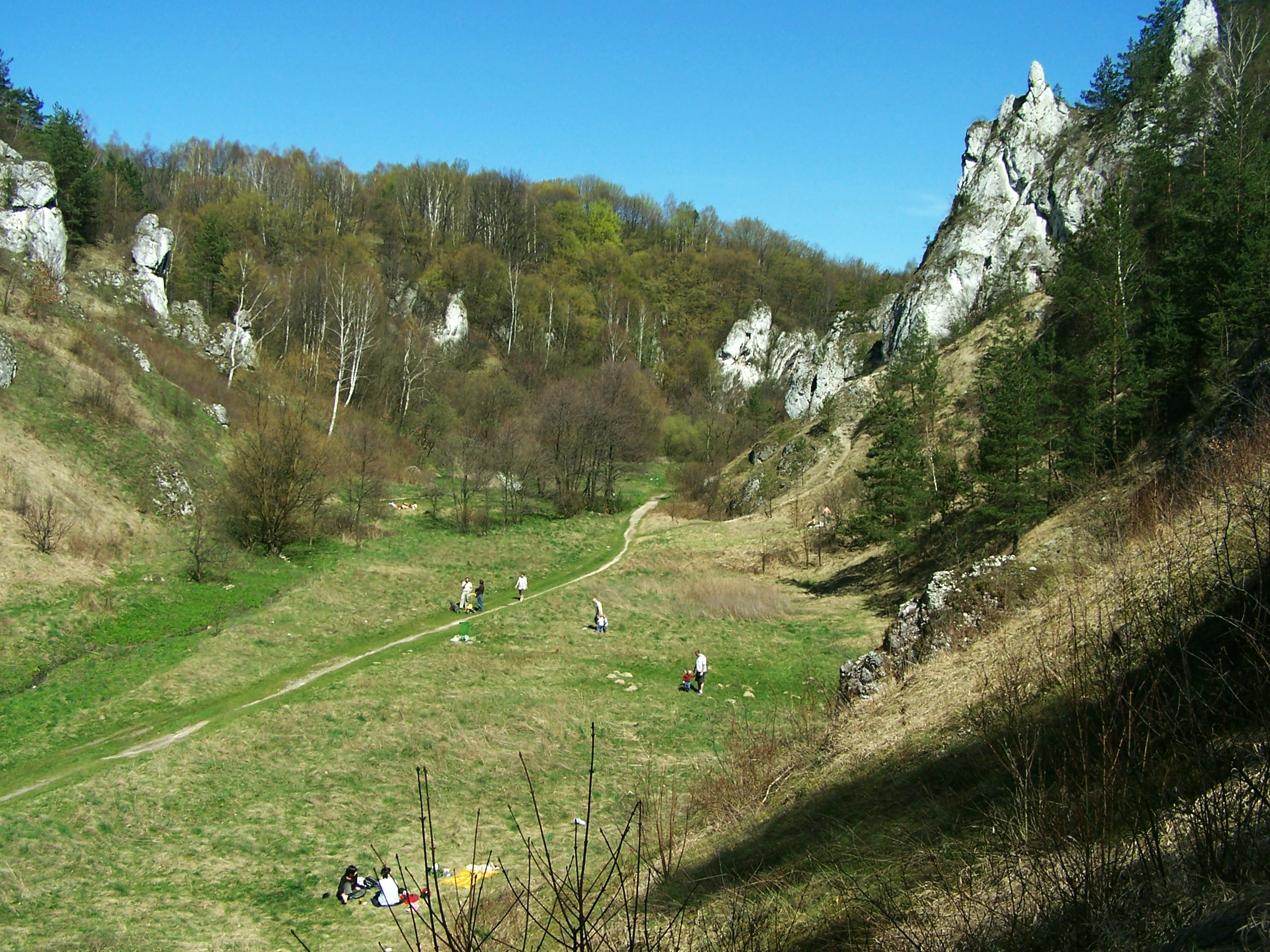 Dolina Kobylańska (Dolinki Krakowskie)